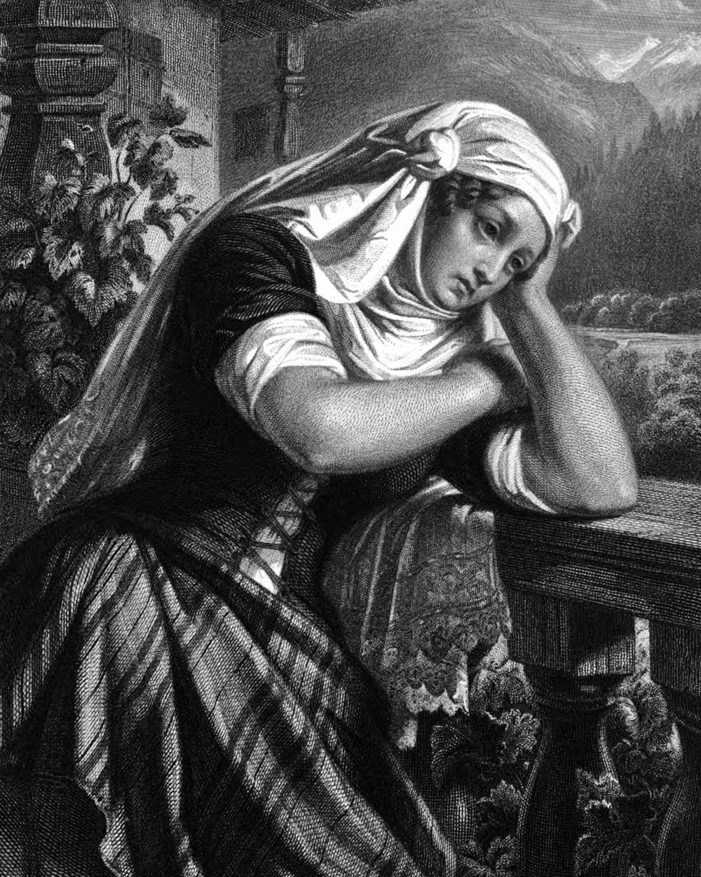 Hedwig, Tells Frau aus Friedrich Schillers Schauspiel Wilhelm Tell, als Stahlstich gestochen um 1859 nach einer Zeichnung von Friedrich Pecht